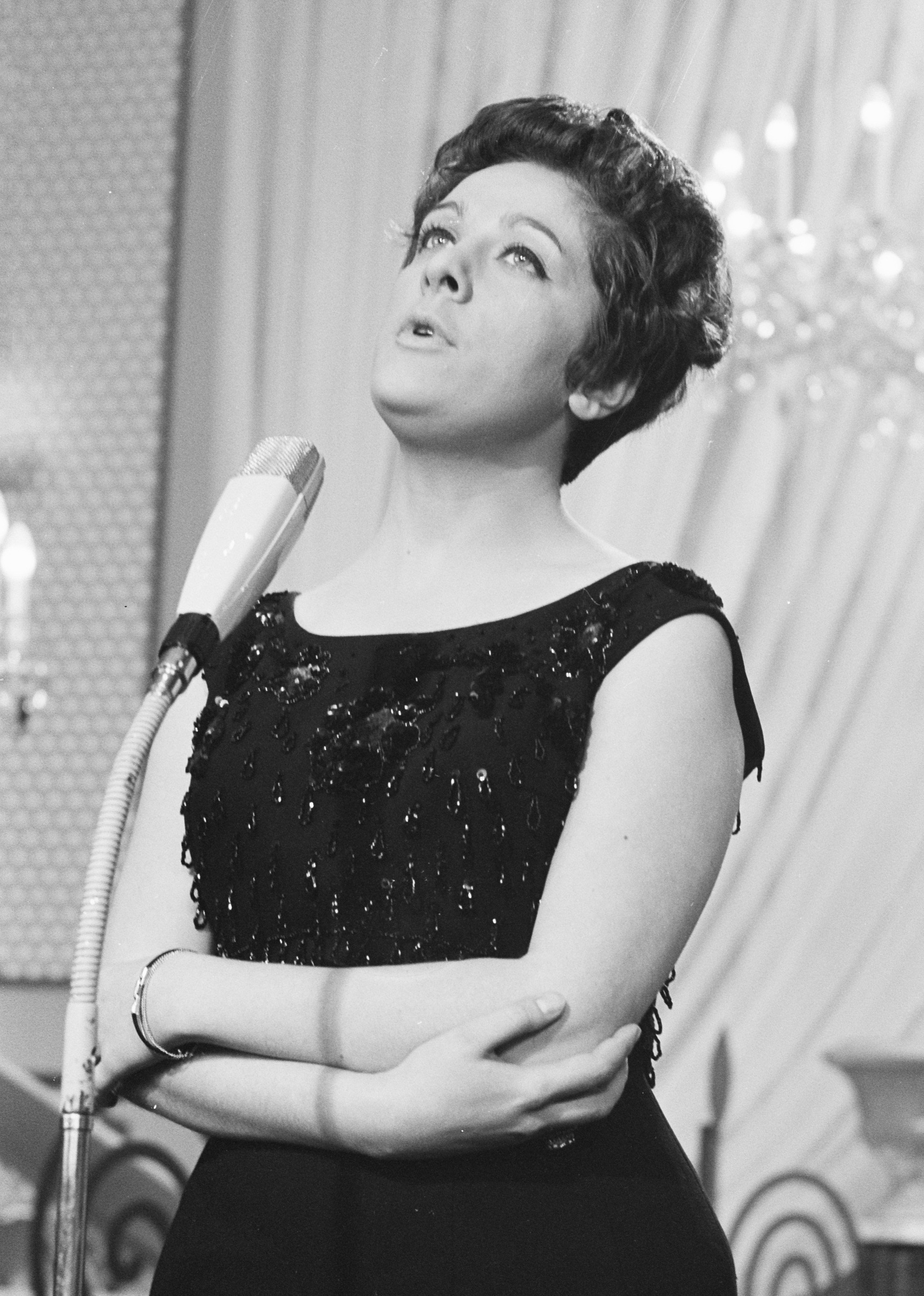 Collectie / Archief : Fotocollectie Anefo Reportage / Serie : [ onbekend ] Beschrijving : Eurovisie Songfestival 1962 te Luxemburg, voor Joegoslavië Lola Novakovic Datum : 18 maart 1962 Locatie : Joegoslavië, Luxemburg Trefwoorden : artiesten, songfestivals Persoonsnaam : Novakovic Lola Fotograaf : Pot, Harry / Anefo Auteursrechthebbende : Nationaal Archief Materiaalsoort : Negatief (zwart/wit) Nummer archiefinventaris : bekijk toegang 2.24.01.05 Bestanddeelnummer : 913-6593